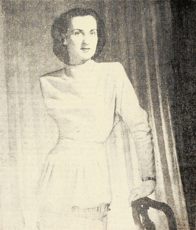 Elisa Pérez Walker, su matrimonio con Horacio Serrano palma ha quedado concertado.